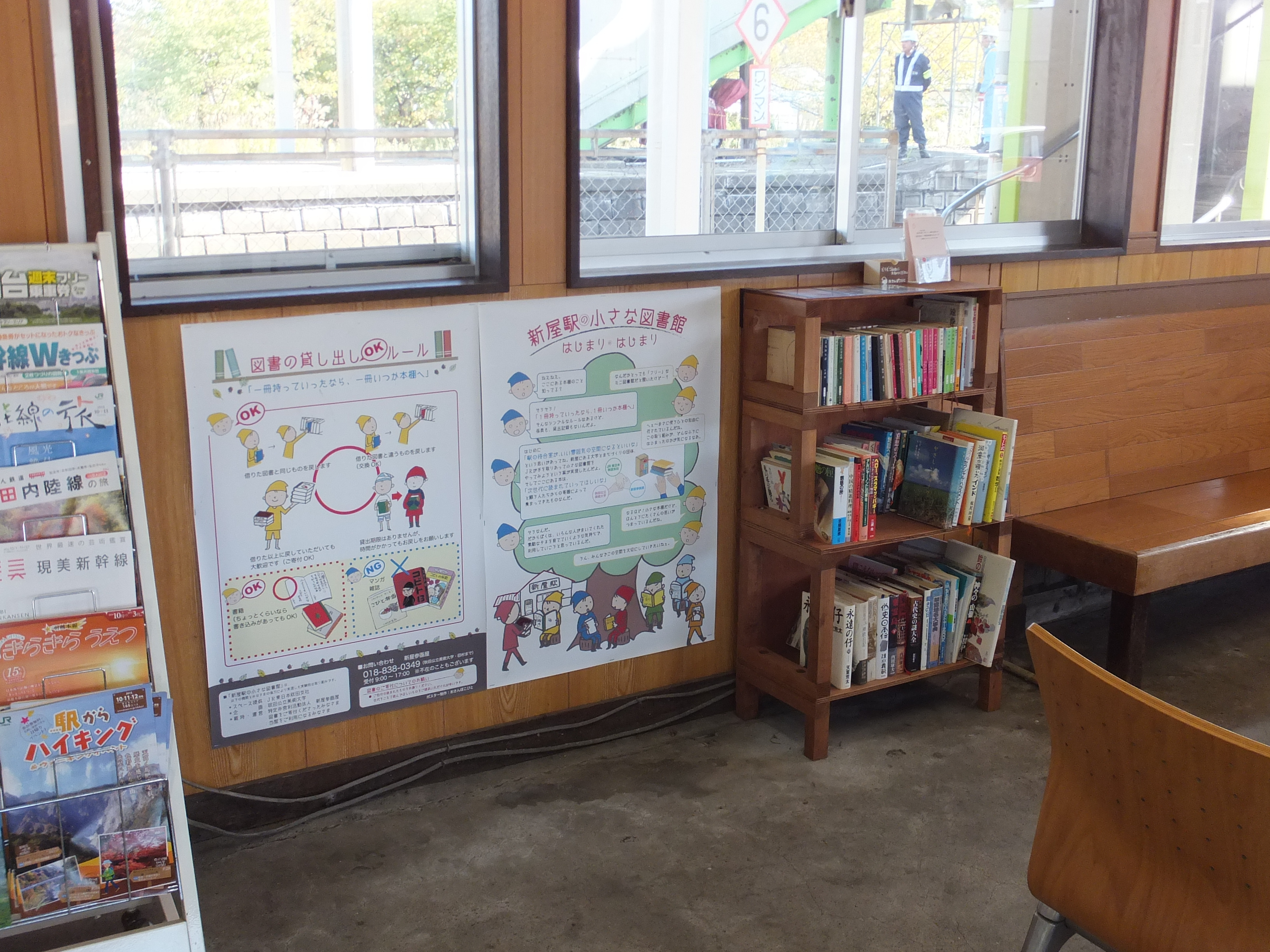 「小さな図書館」運動取組みの事例。秋田市の新屋駅待合室内に2016年6月から設置された。